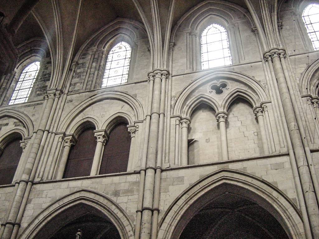 Choeur de la cathédrale de Lisieux. Auteur : Osbern Date : 2002